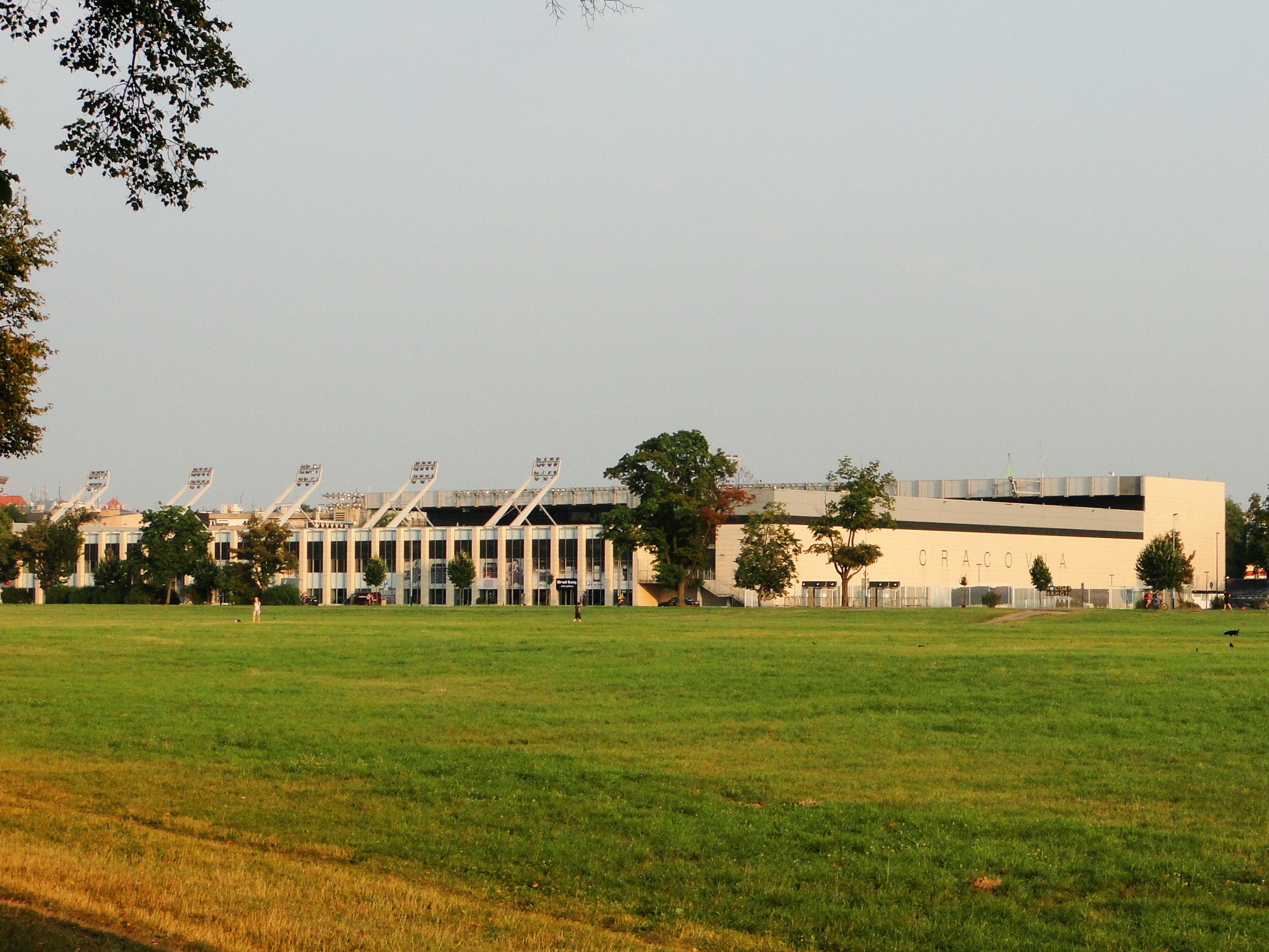 Stadion Cracovii przy Błoniach